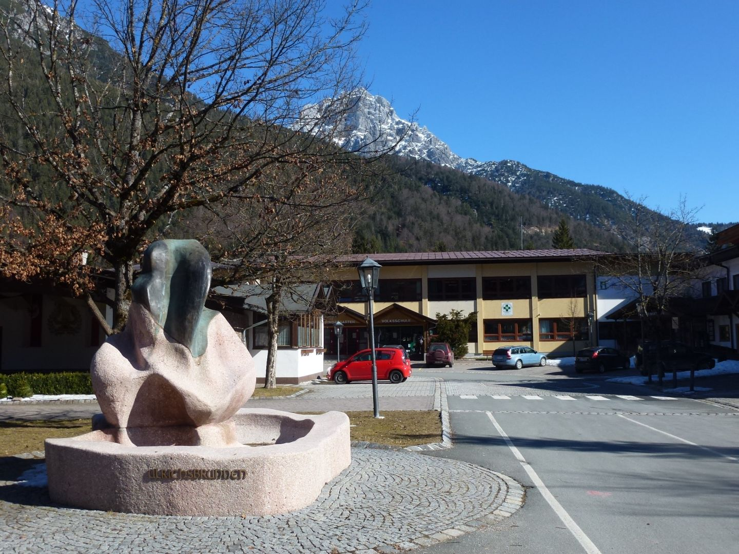 Ulrichsbrunnen vor der Schule in St. Ulrich